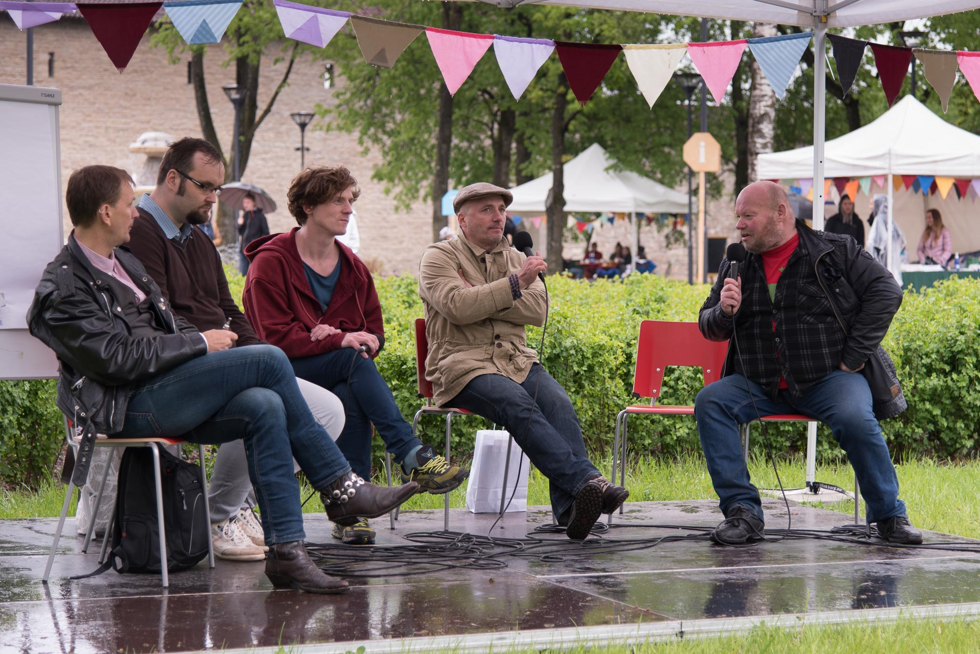 Arutelu juhib Ago Gaškov. Narva [eel]arvamusfestival.